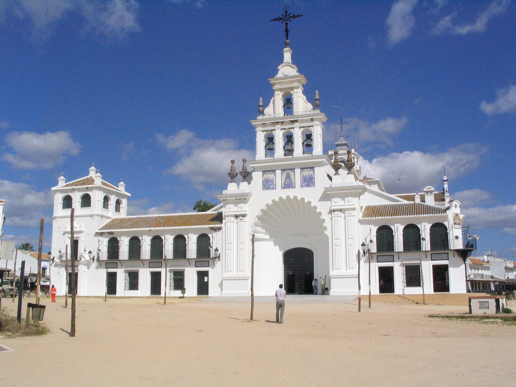 El Rocío, Almonte, Huelva (España)